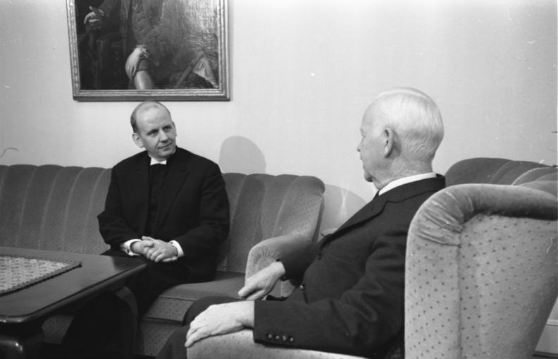 Bundespräsident emfängt den Generalsekretär des Lutherischen Weltbundes, Dr. Kurt Schmidt-Clausen